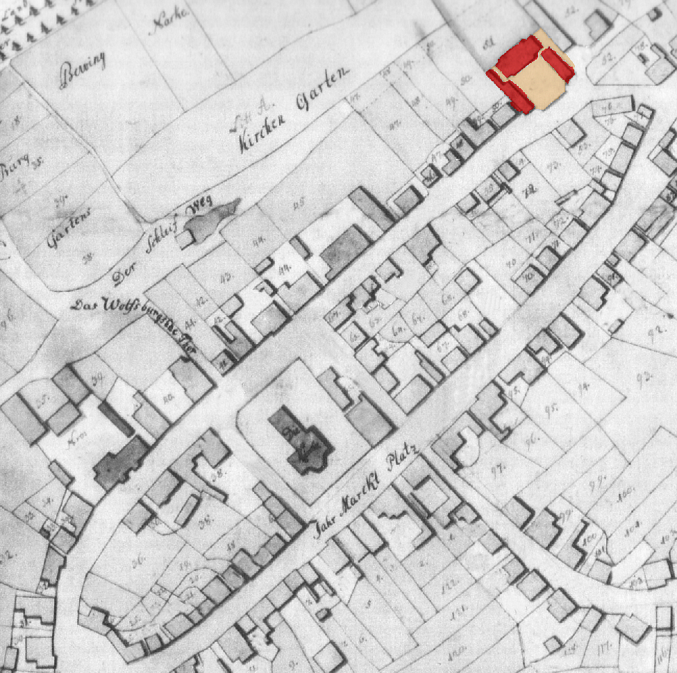 Plan von Vorsfelde von 1771 mit Sitz des Amtshofes Vorsfelde